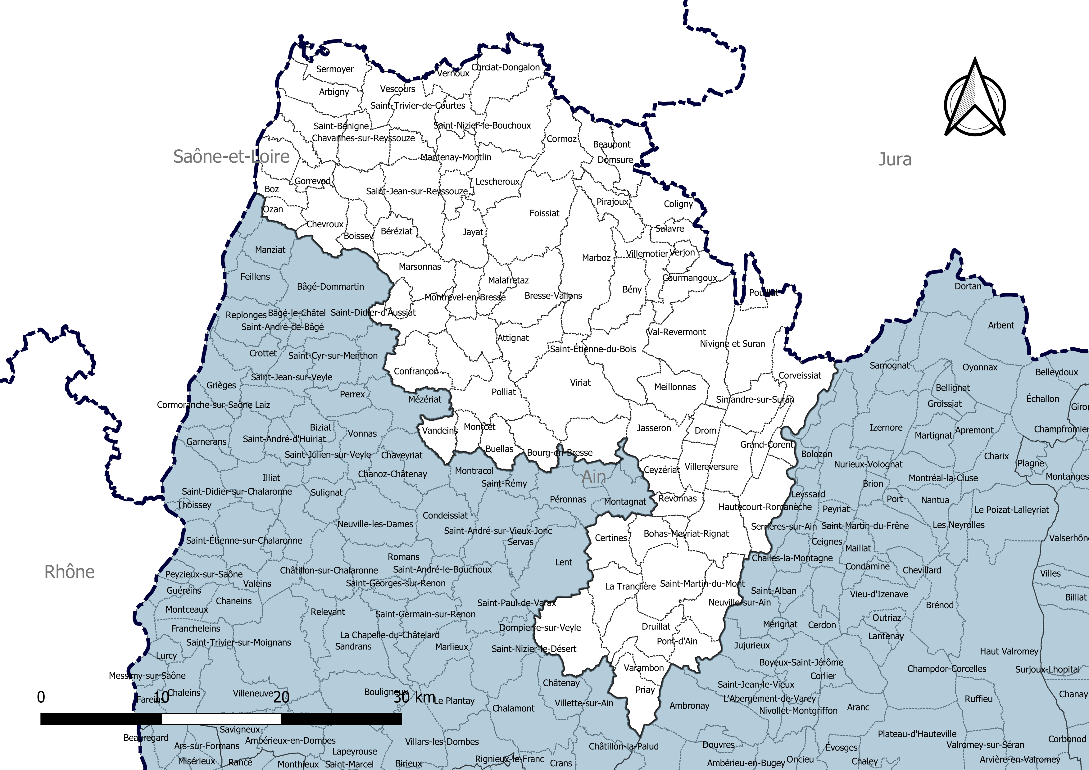 Carte de la première circonscription du département de l’Ain, France. Composition en communes au 1er janvier 2019.